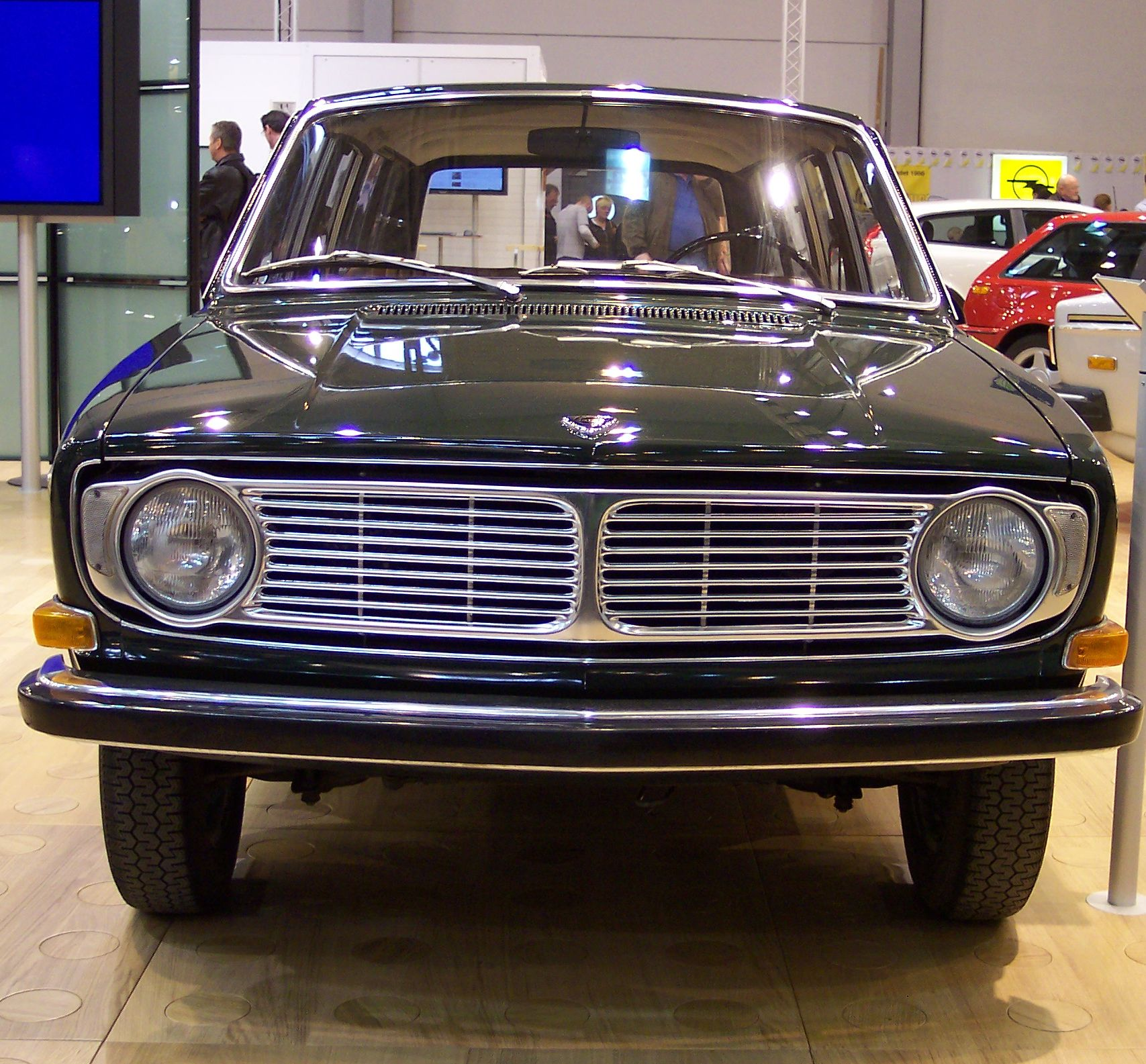 Volvo 145 (year 1968)